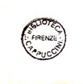 Stempel der Biblioteca del Convento dei Cappuccini di Montughi, Florenz